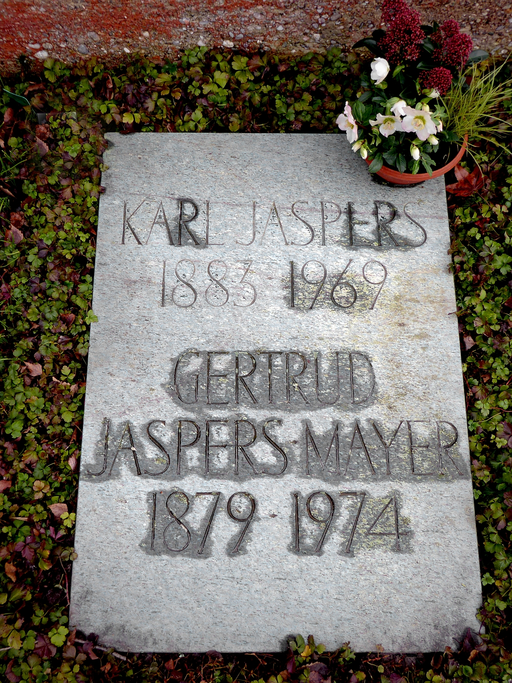 Karl Jaspers (1883–1969) Psychiater, Philosoph, Professor, Geschichtsphilosophie, Religionsphilosophie, Ehrendoktortitel der Universitäten Lausanne, Heidelberg, Paris, Genf und Basel. Grab auf dem Friedhof Hörnli, Riehen, Basel-Stadt